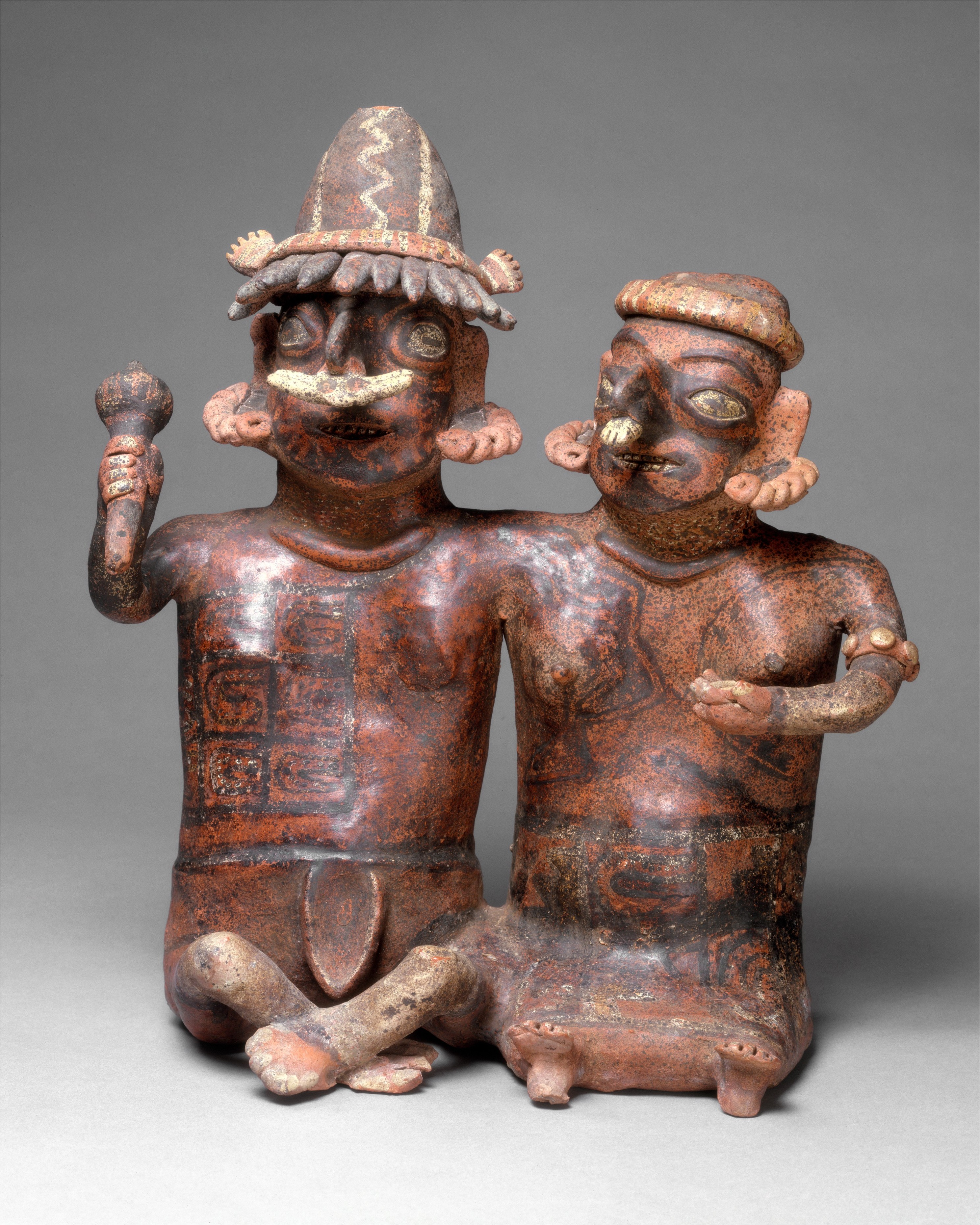 Ixtlan del Río; Ancestor figure; Ceramics-Sculpture